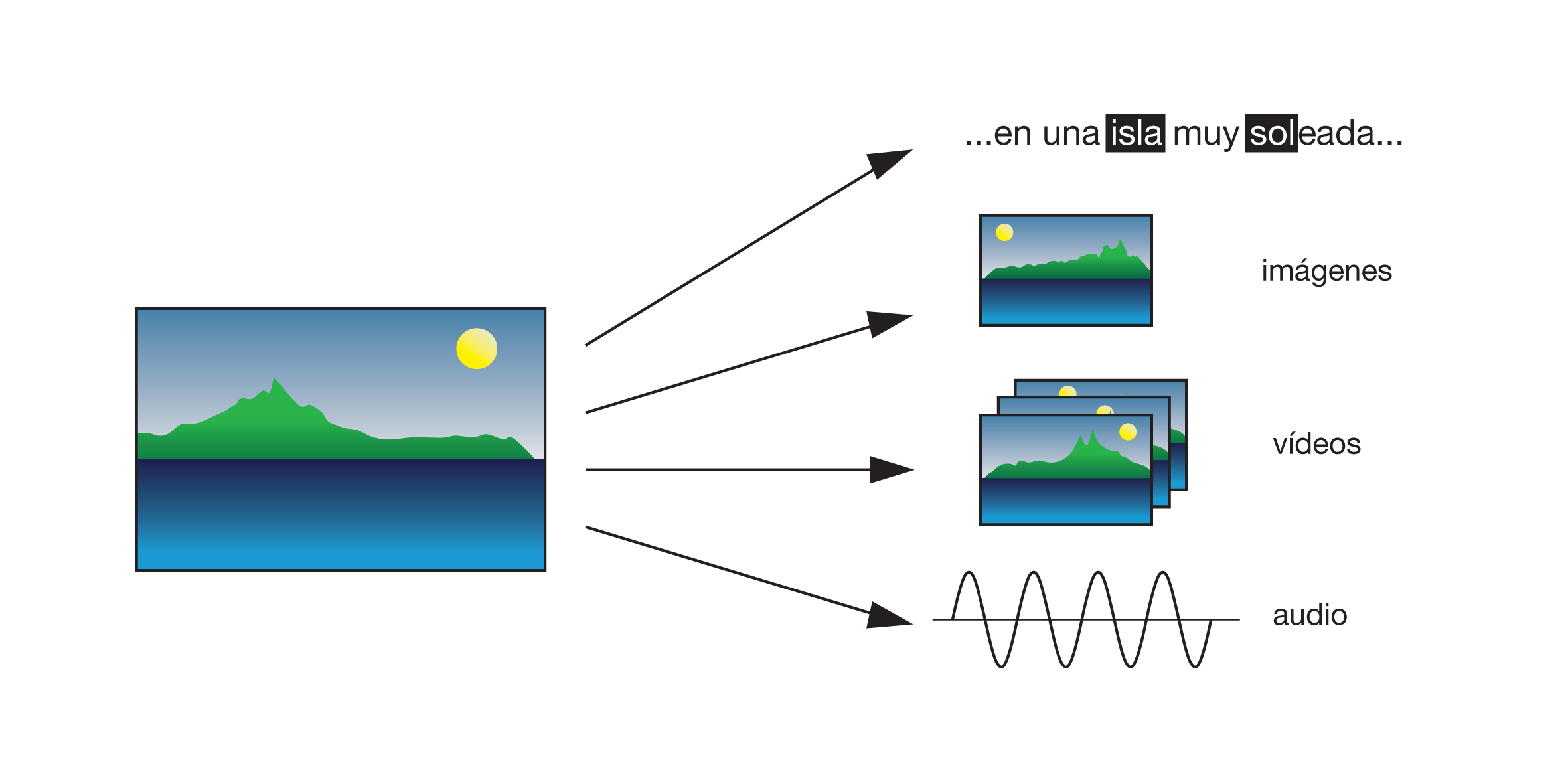 Búsqueda a partir de una imagen ejemplo